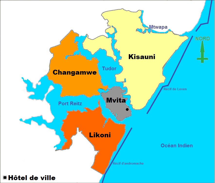 Carte administrative de Mombasa